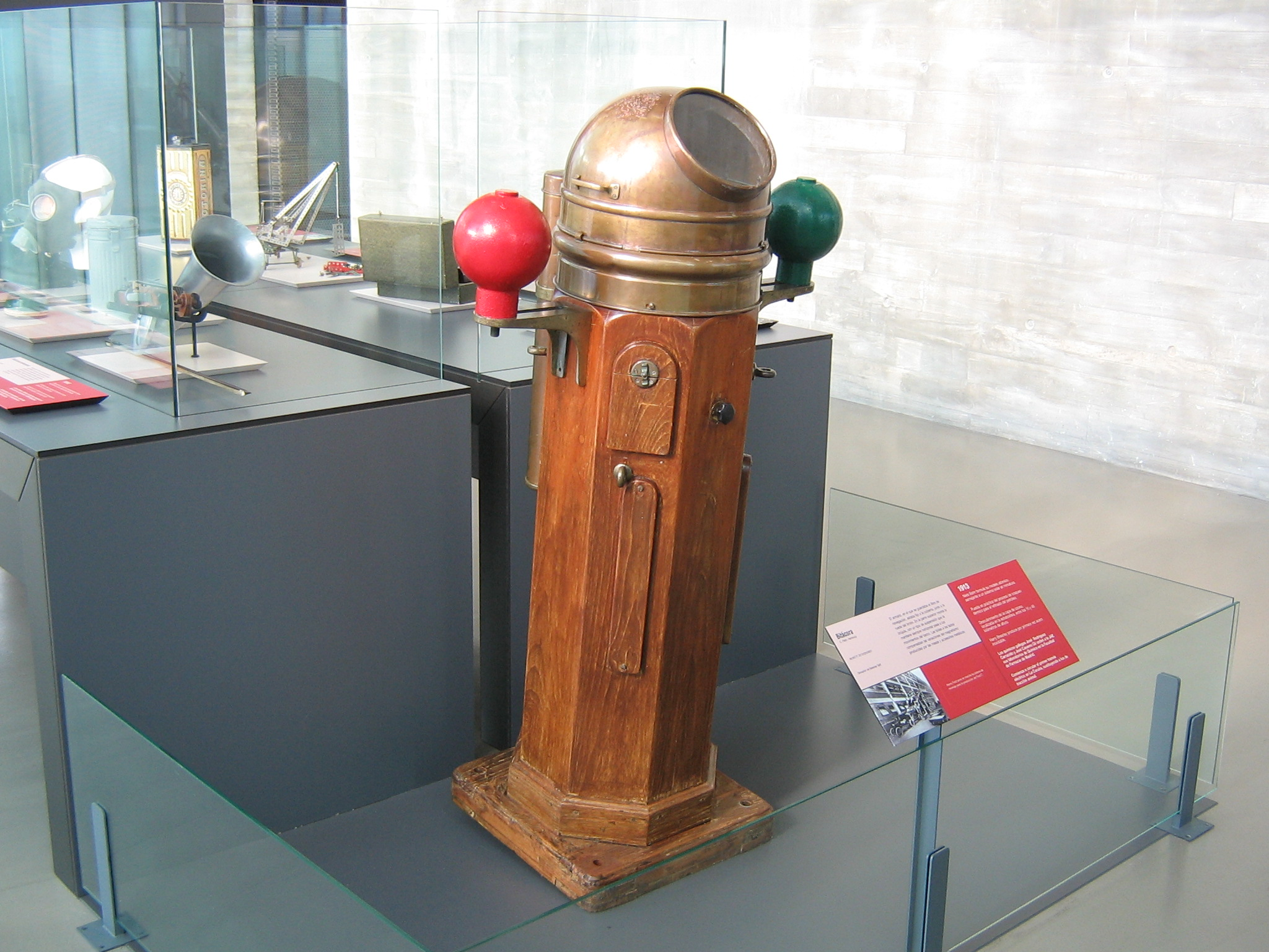 Bitácora de un barco en el MUNCYT.